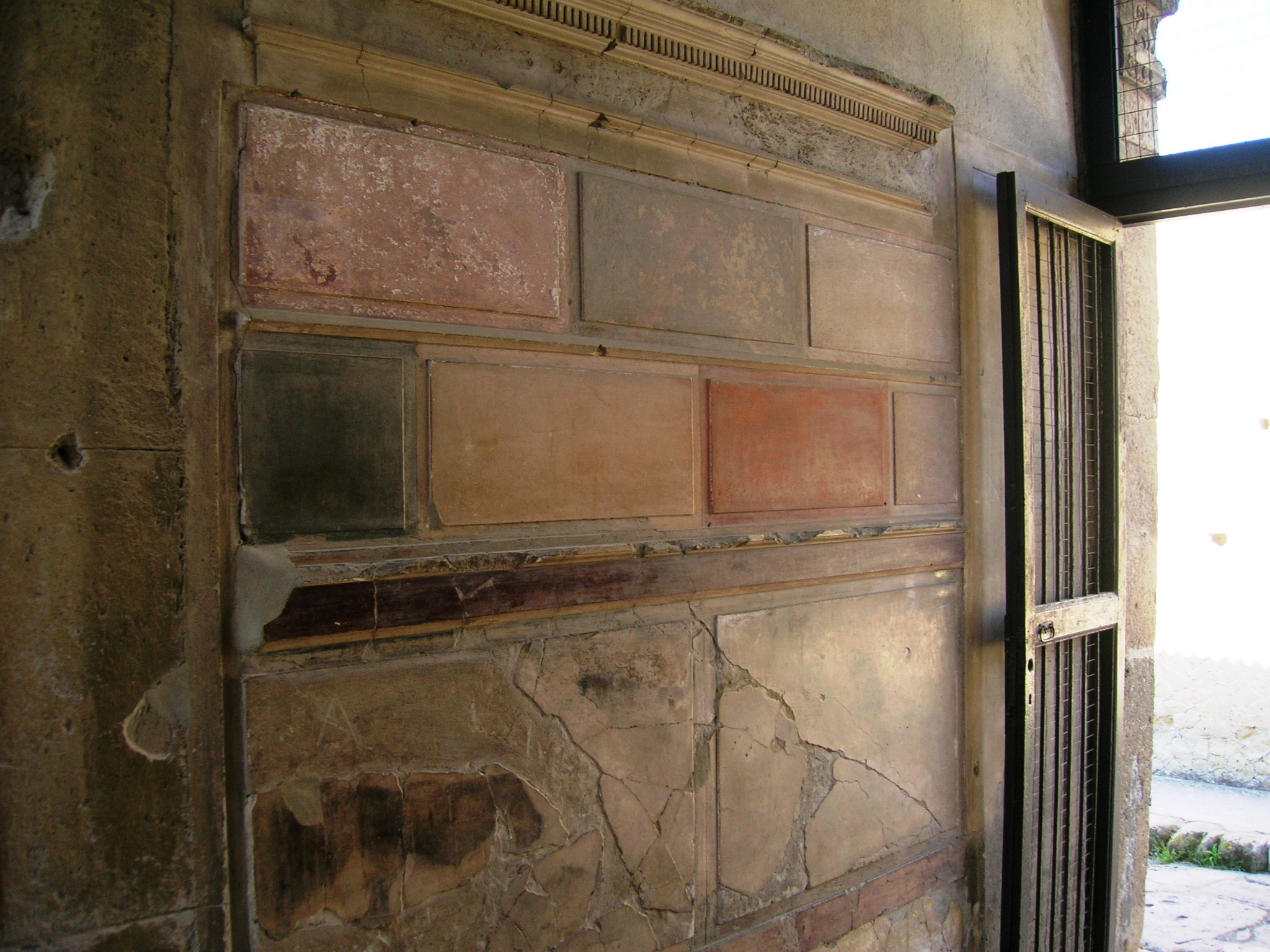 La Casa Sannitica ad Ercolano